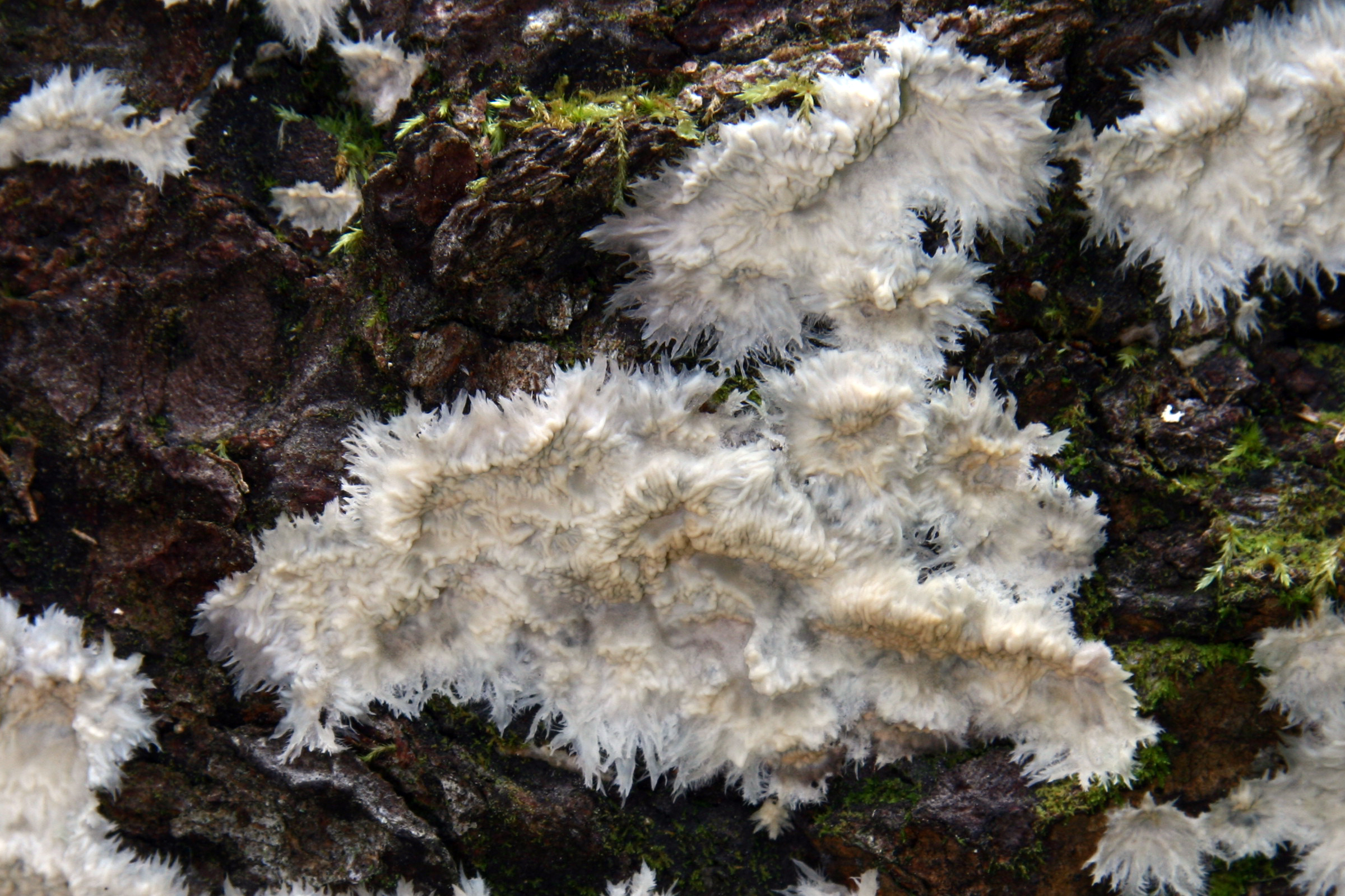 Rynkskinn